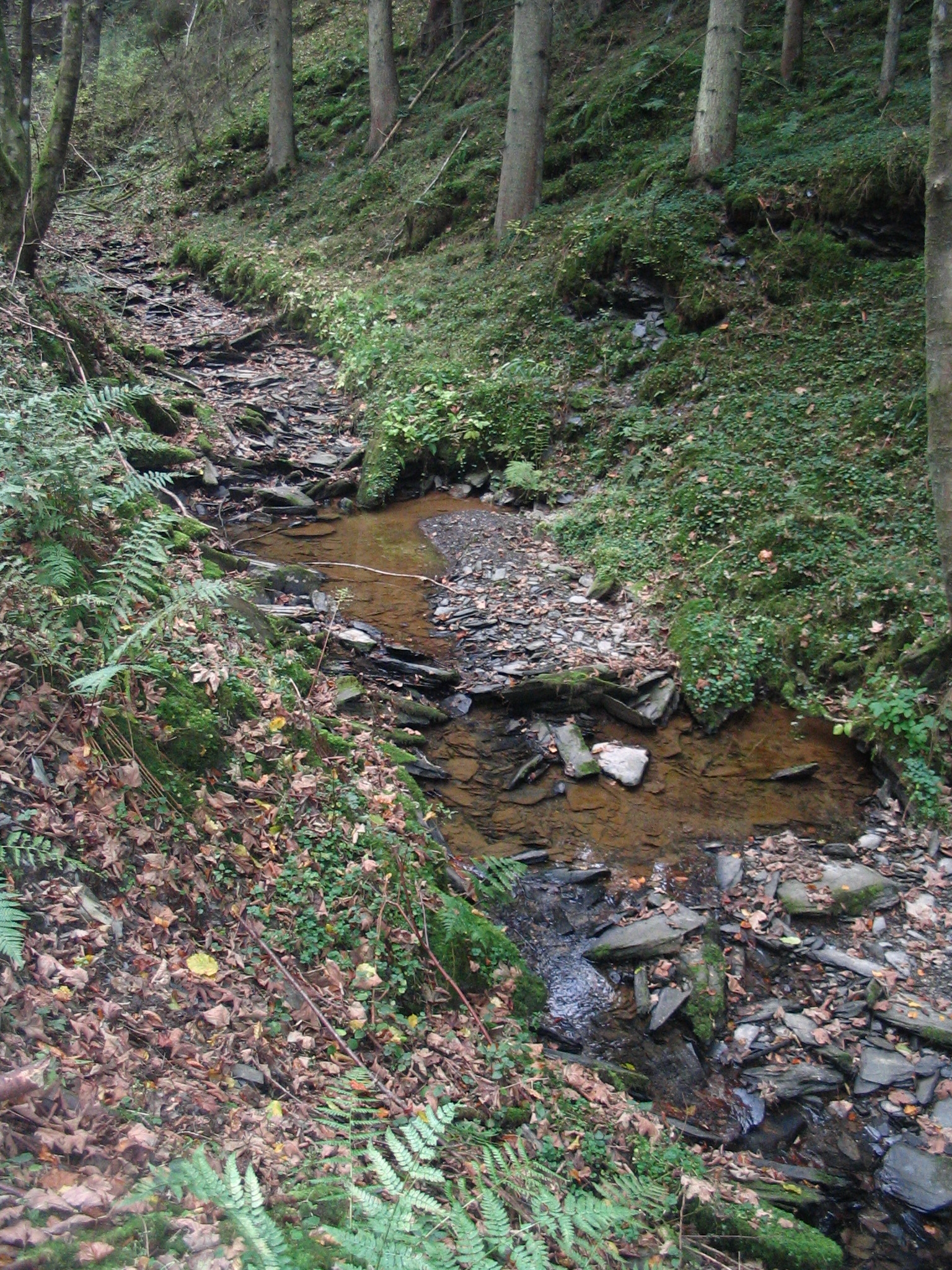 Bei Niedrigwasser läuft das Wasser durch den Schieferabraum